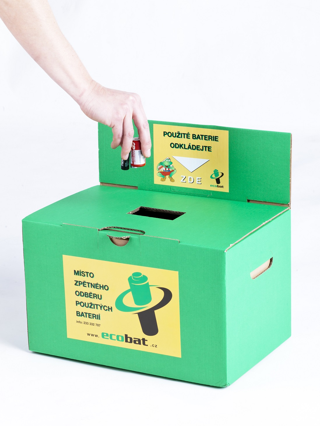 Krabice ECOBAT ke sběru použitých baterií.